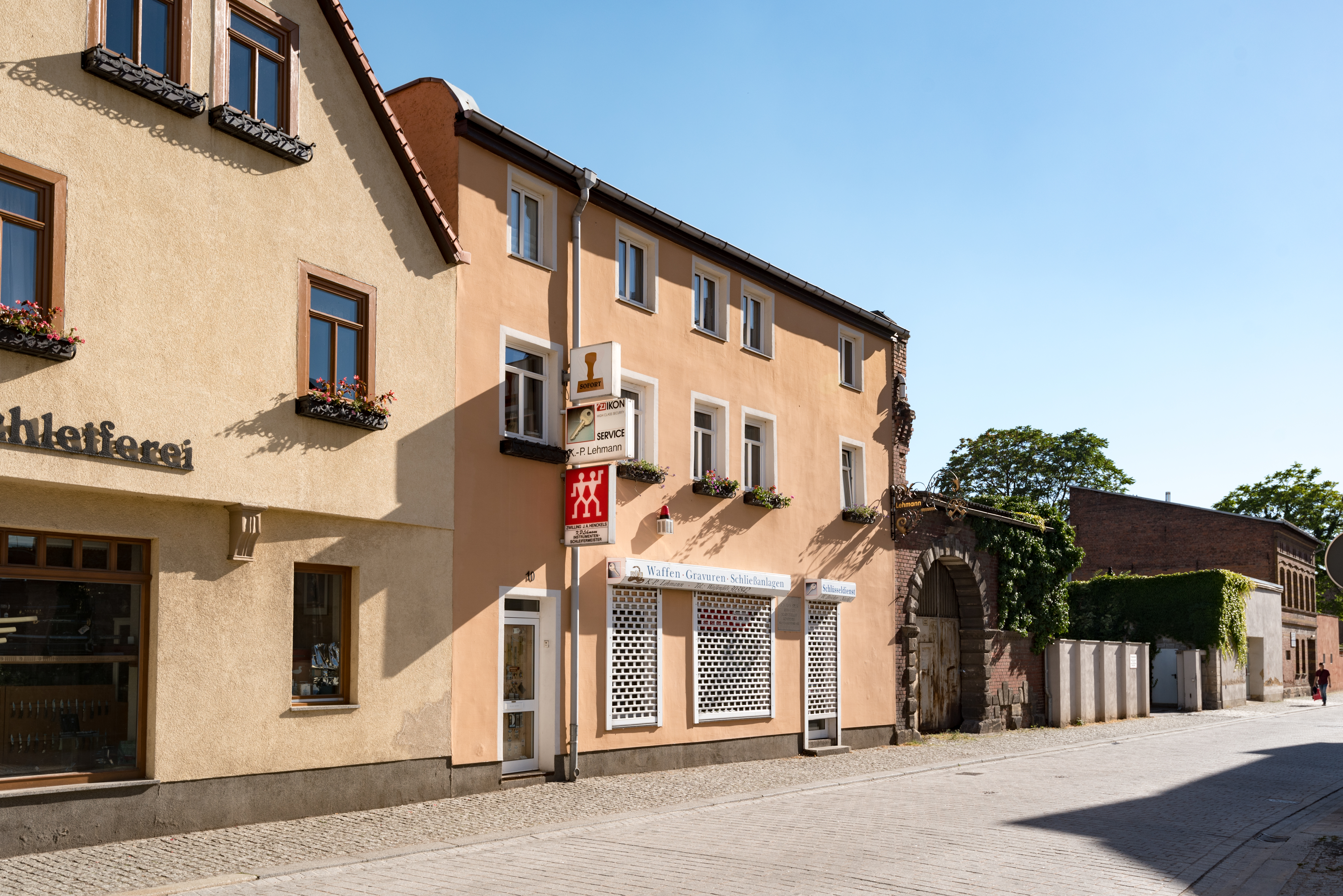 Weißenfels, Große Kalandstraße 10